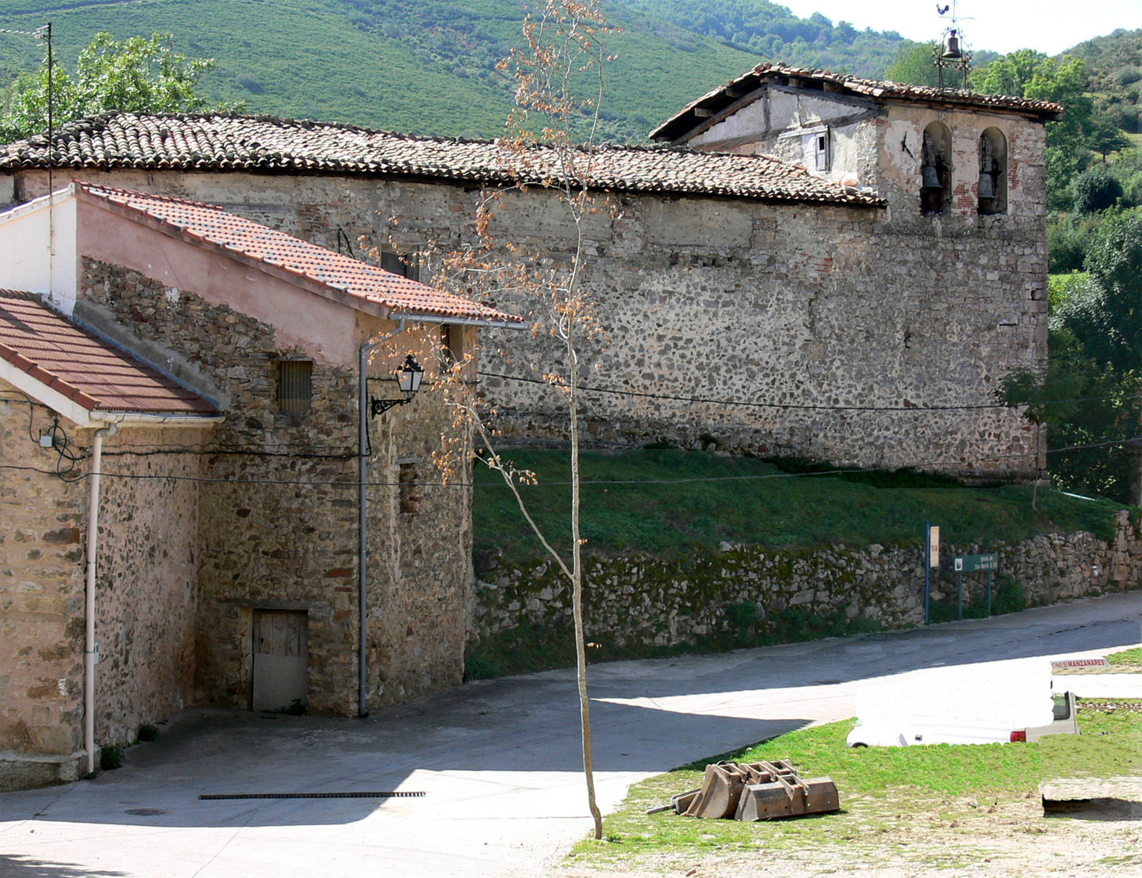 Iglesia de San Martín en Pazuengos (La Rioja - España)